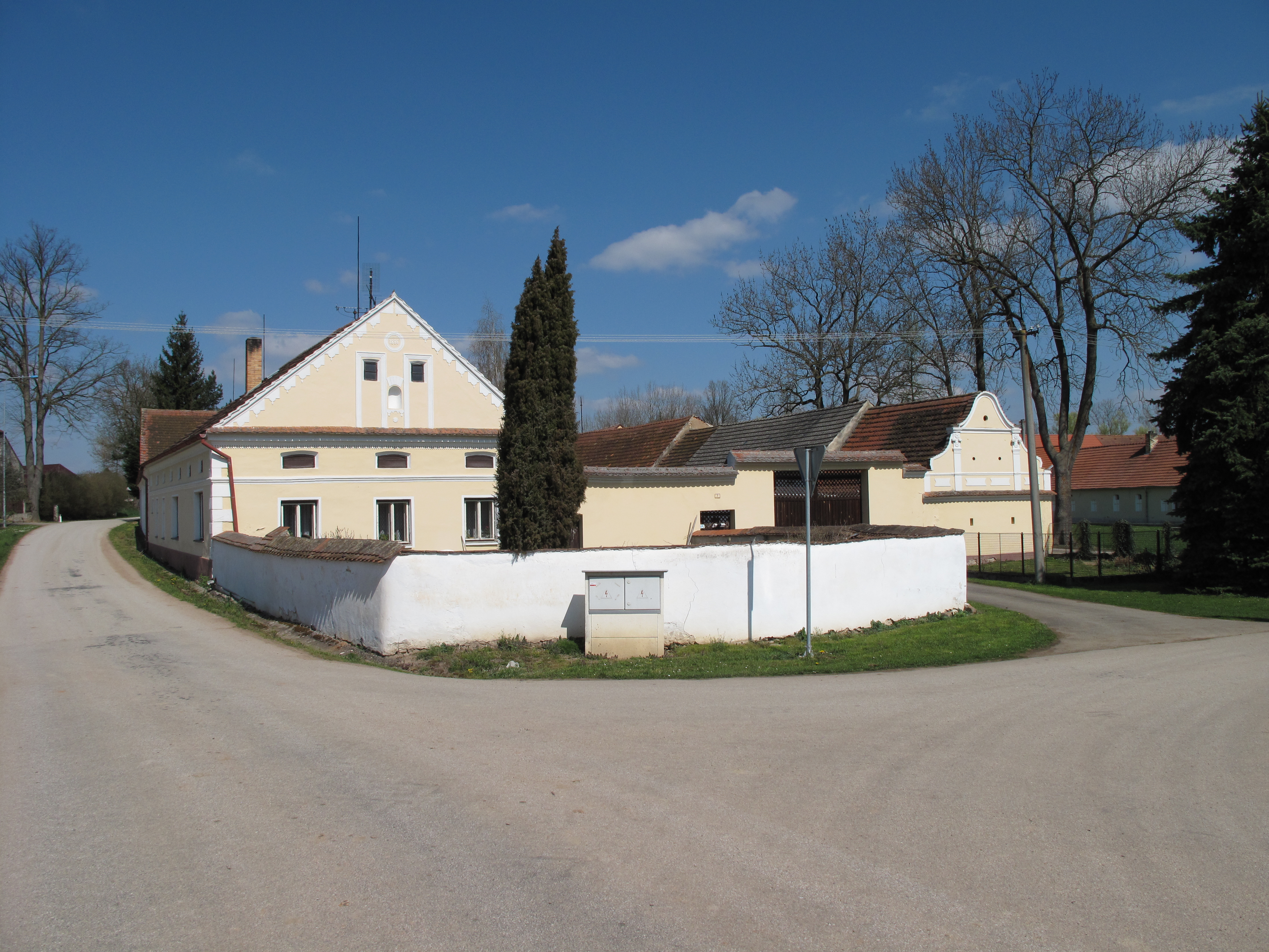 Statek v Sedlíkovicích. Okres České Budějovice, Česká republika.